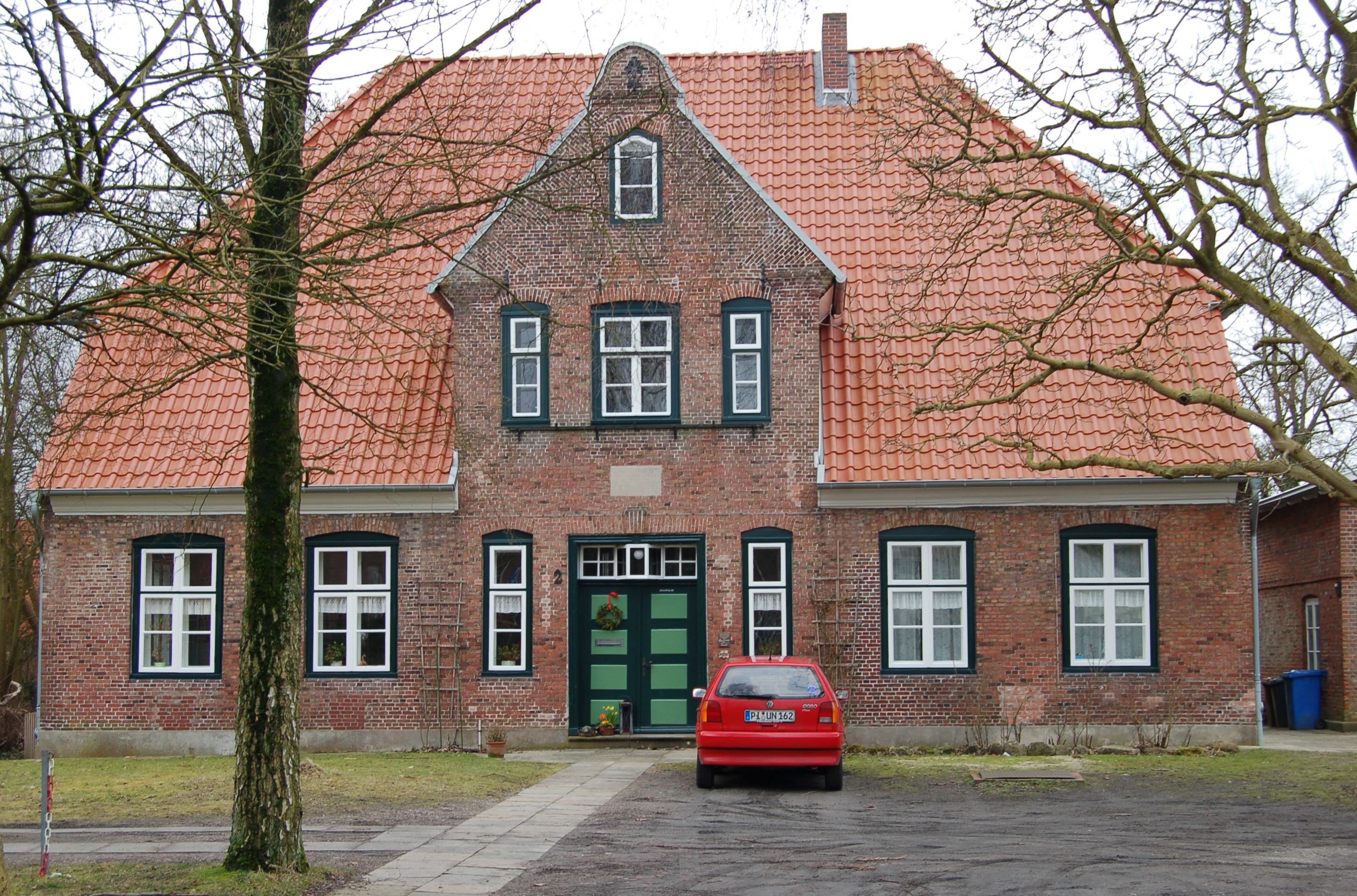 Das Hauptpastorat in der Moltkestr. aus den Jahr 1781. Wohnsitz des Probstes Johannes P. Chr. Bröker (1806-1890). Broker war der Schwager des Generalfeldmarschalls Helmuth Karl Bernhard von Moltke. Moltke hielt sich oft für Wochen zur Entspannung in diesem Haus auf und war zudem Finanzgeber des ehemaligen Krankenhauses (Bleekerstift) in Uetersen.